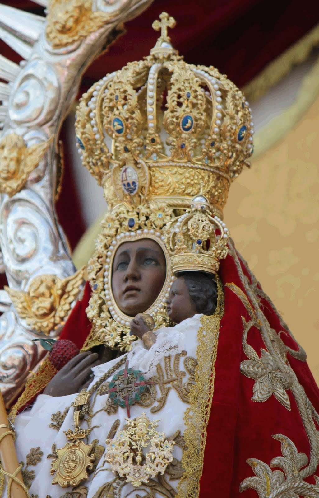 virgen de la cabeza